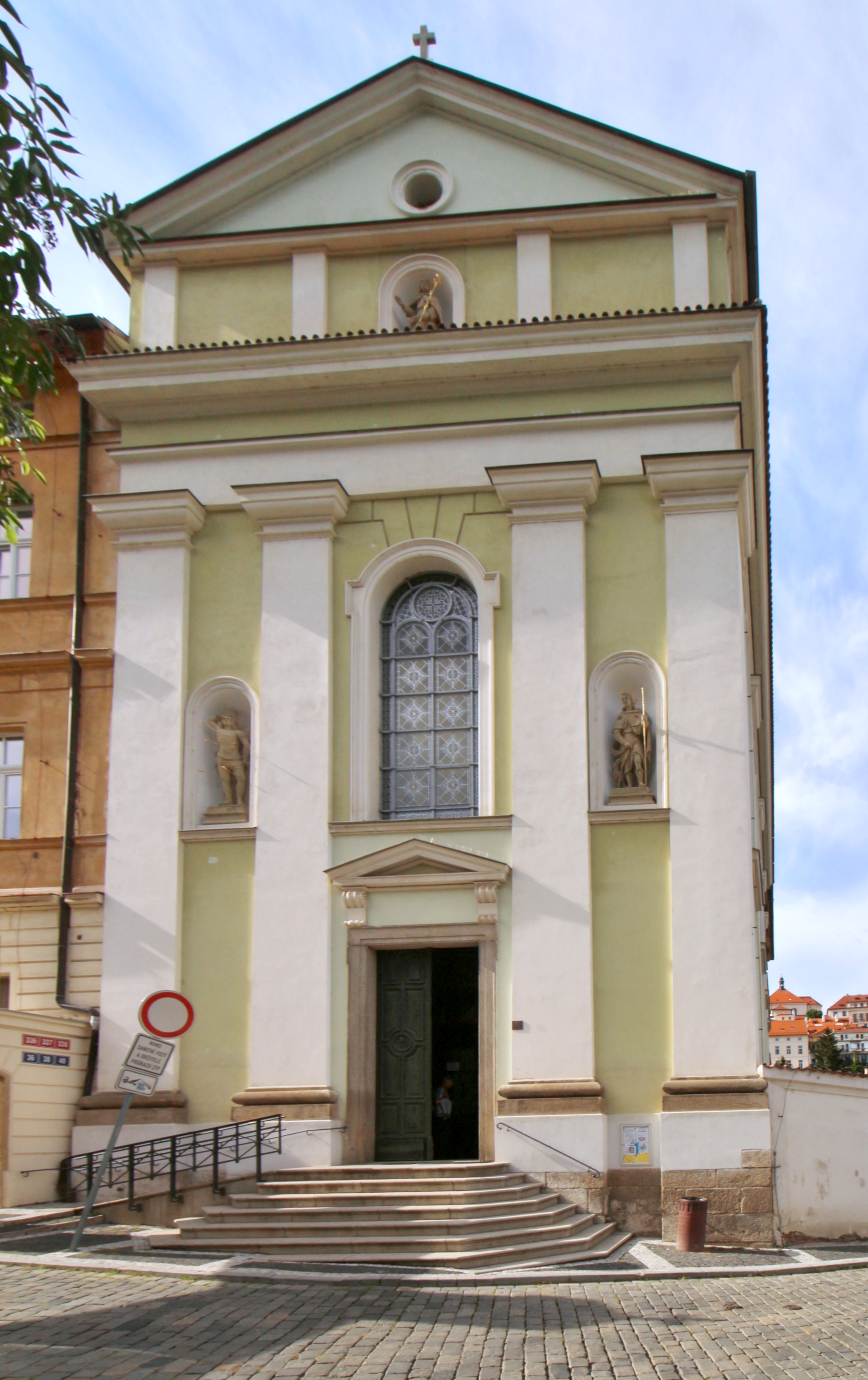 Malá Strana, kongregace Milosrdných sester sv. Karla Boromejského